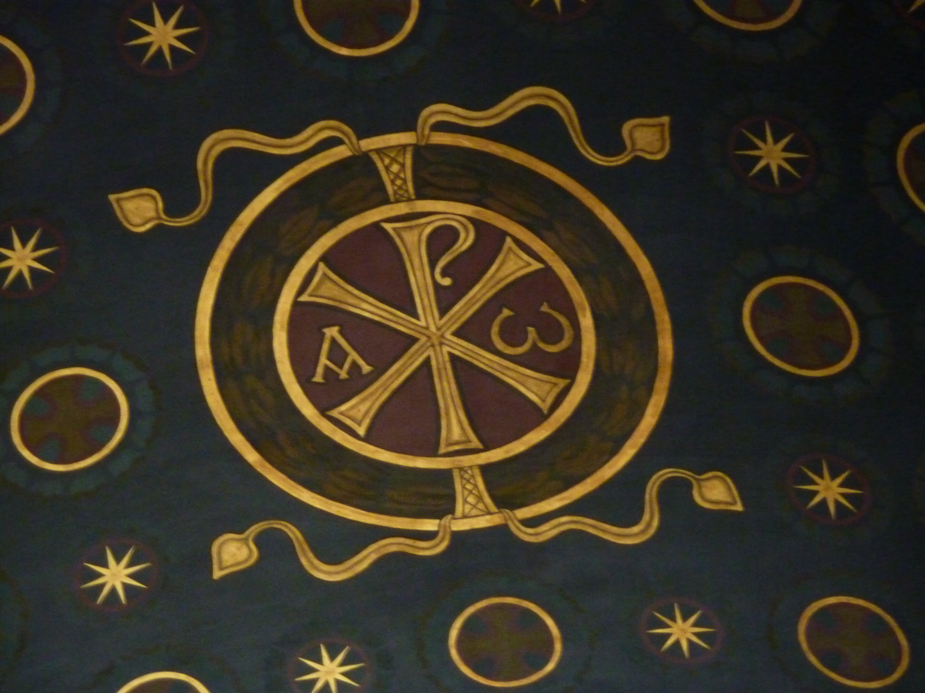 Chrisme, Église Saint-François-Xavier, PARIS, 75007, FRANCE